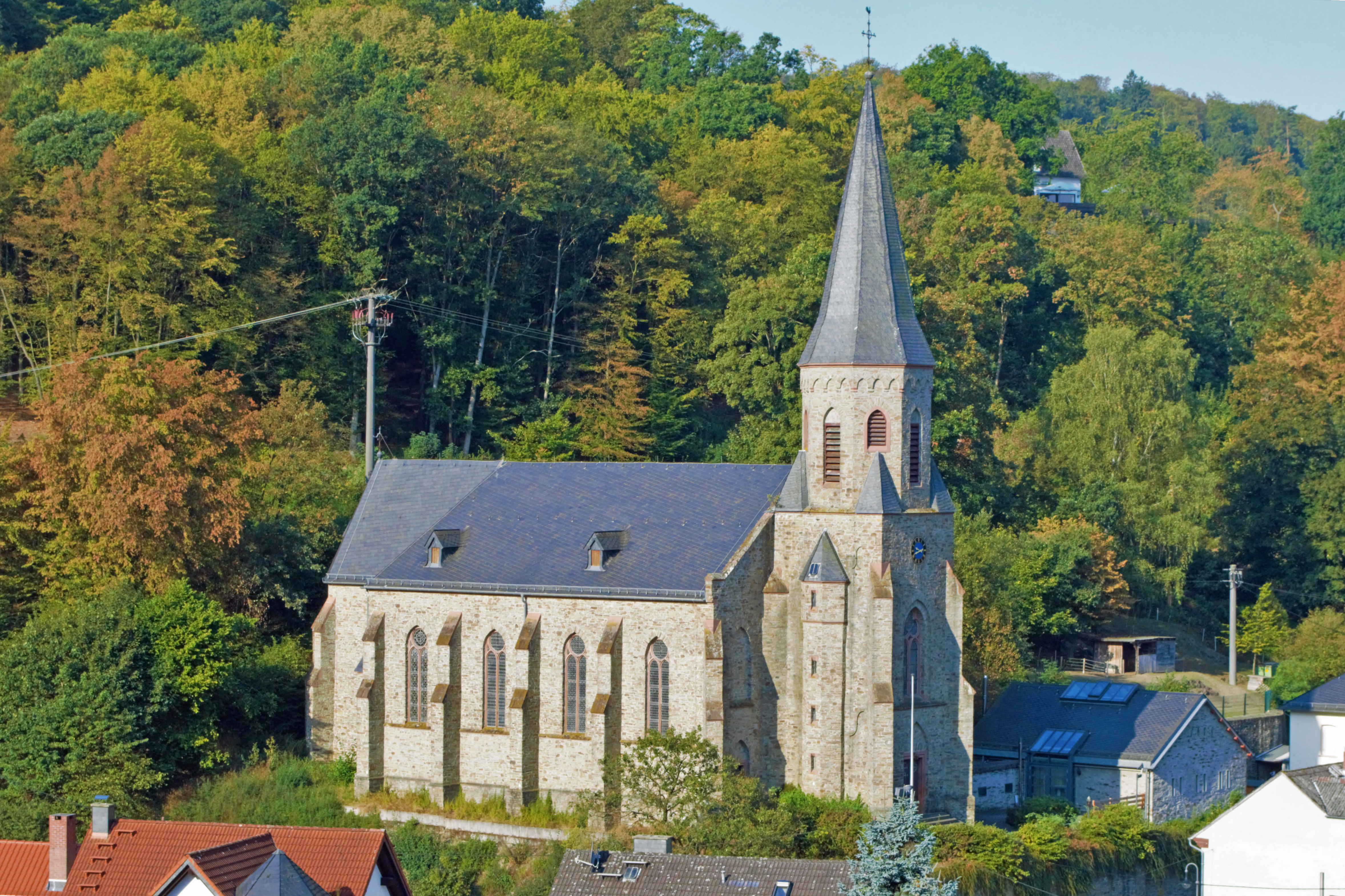 Katholische Kirche St. Johannes der Täufer - 1872-75 mit einer Stiftung des Kransberger Bürgers Johannes Discher nach den Plänen des Baumeisters Contzen im neogotischen Stil errichtete Pfarrkirche